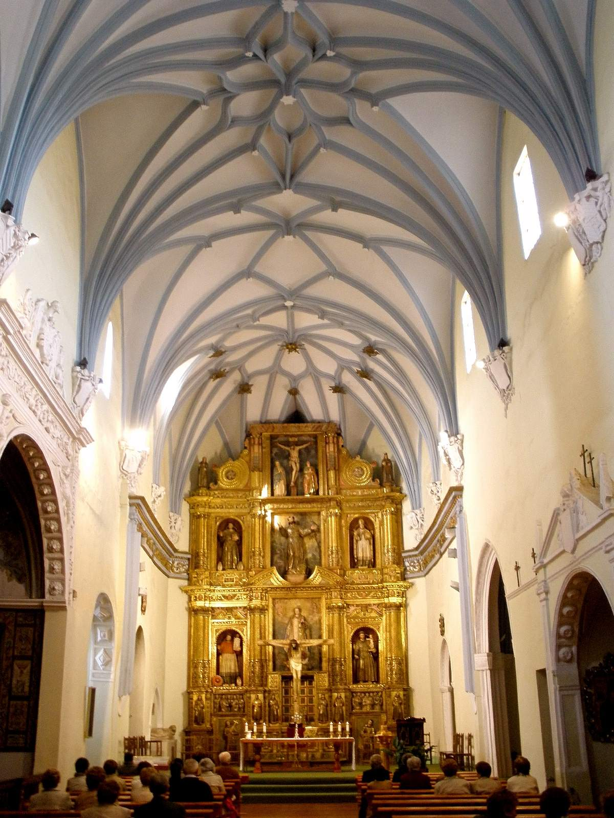 Iglesia de San Francisco, Tarazona